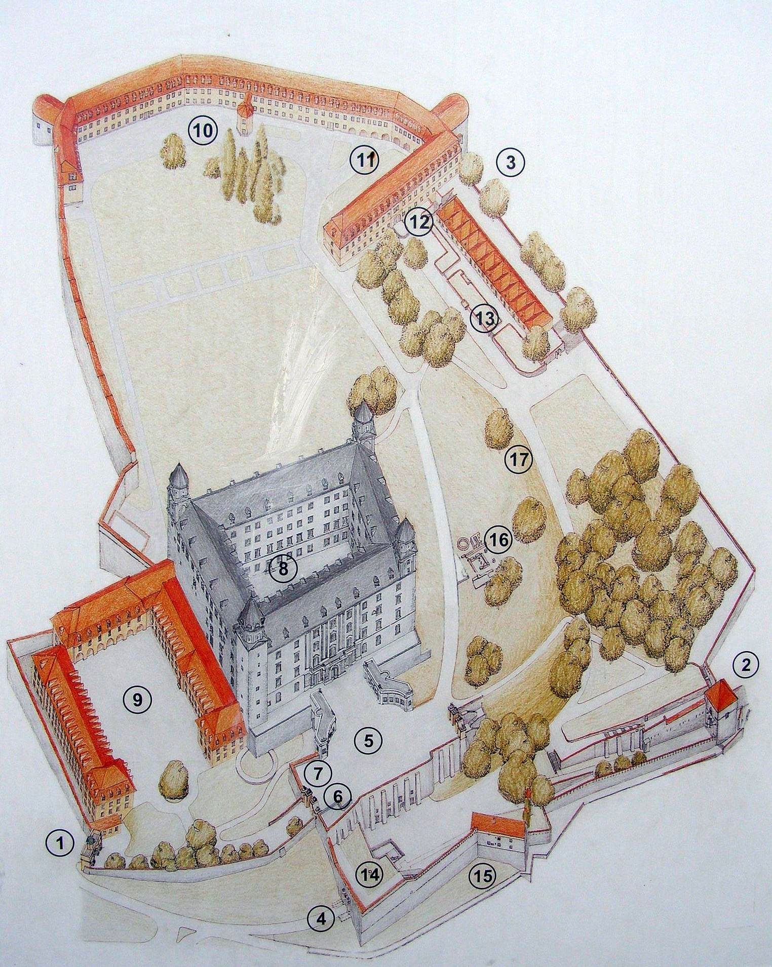 Plán Bratislavského hradu (informačný panel v areáli hradu): 1 - Viedenská brána 2 - Žigmundova brána 3 - Mikulášska brána 4 - Leopoldova brána 5 - Čestné nádvorie 6 - Vyhliadkový bastión 7 - Suterén pod Čestným nádvorím 8 - Kráľovský palác 9 - Budovy na západnej terase 10 - Budova na severných hradbách 11 - Bašta Luginsland 12 - Budova pri Mikulášskej bráne 13 - Hradná vináreň 14 - Juhozápadný bastión 15 - Dom v južnom bastióne 16 - Základy veľkomoravskej baziliky z 9. storočia a Kostola najsv. Spasiteľa z 11. storočia 17 - Cisterna